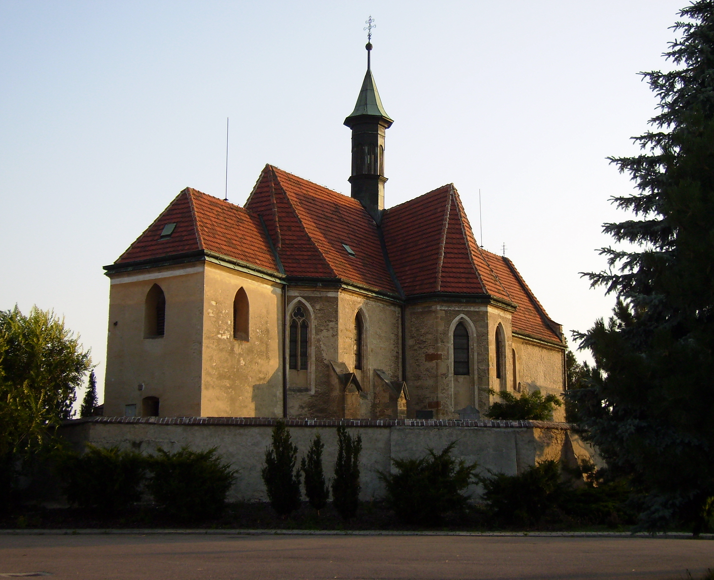 Kostel Nalezení sv. Kříže v Bříství